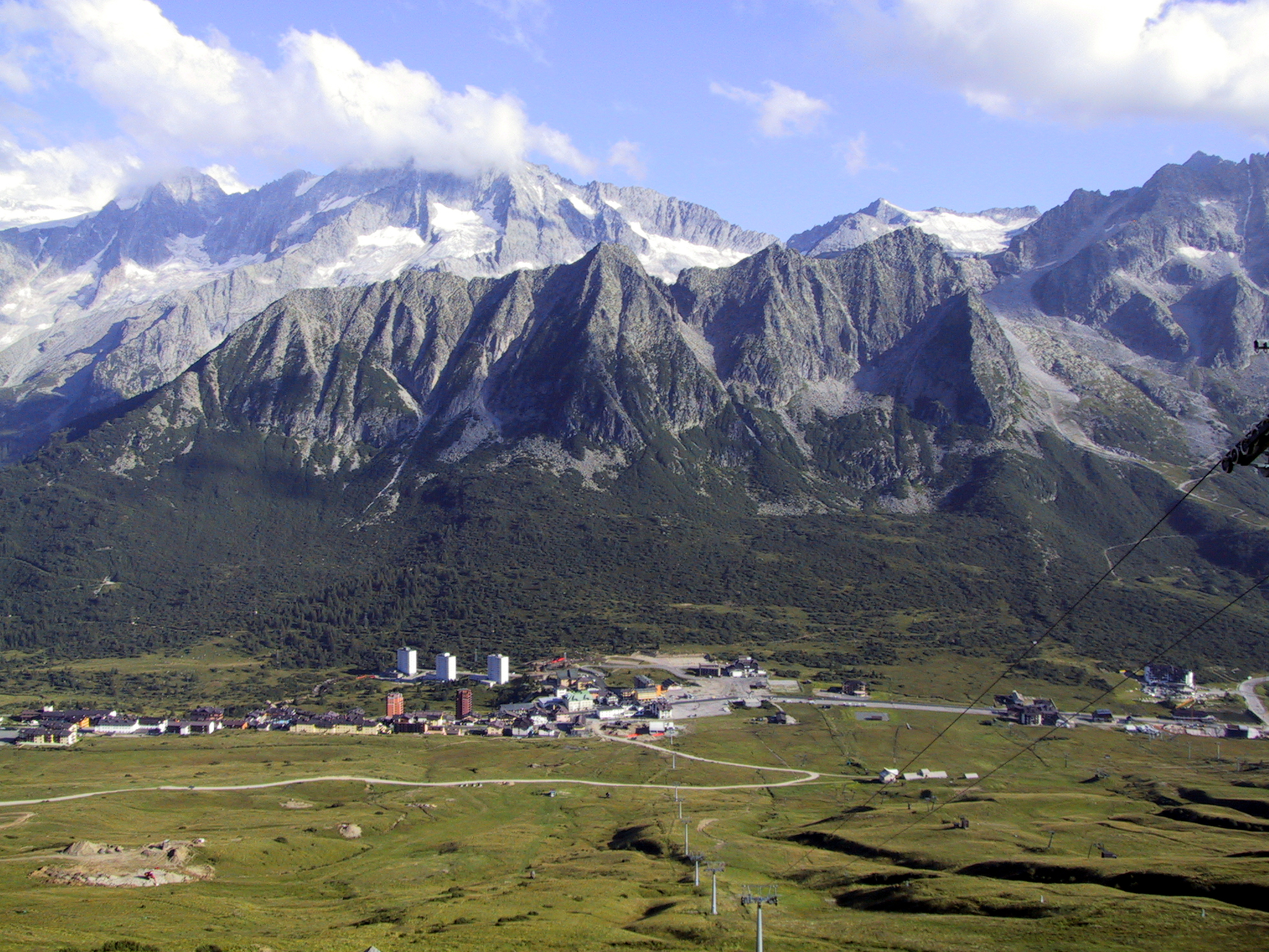 Passo del Tonale ripreso dall'arrivo delle seggiovia Alpe Alta (m.2245). Estate 2002 - Foto da me scattata e rilasciata nel pubblico dominio.